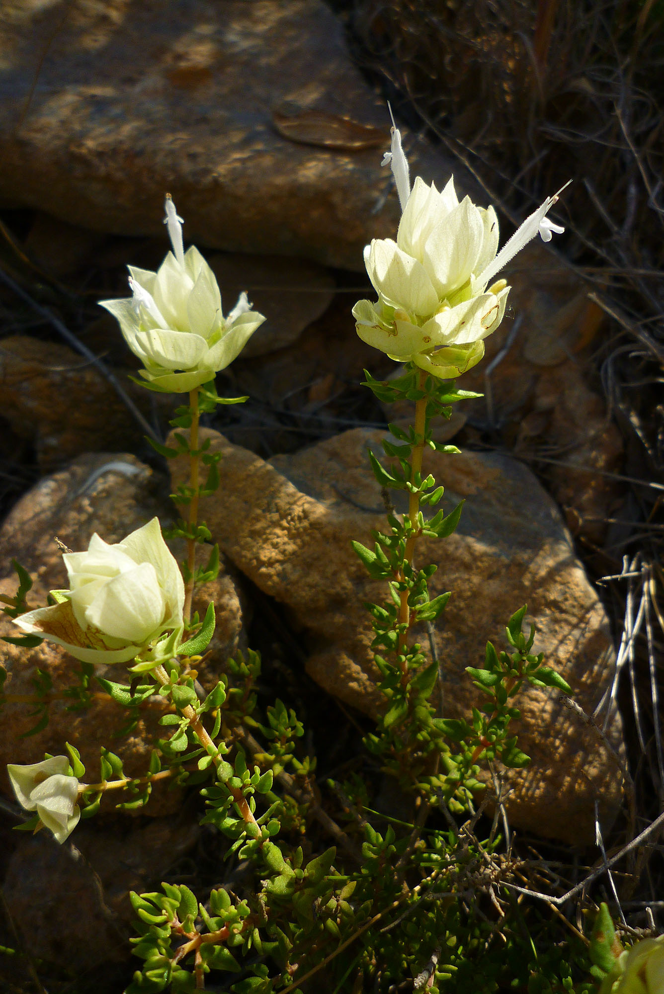 Thymus membranaceus en las sierras de Cartagena, España. Endemismo del sureste Ibérico.